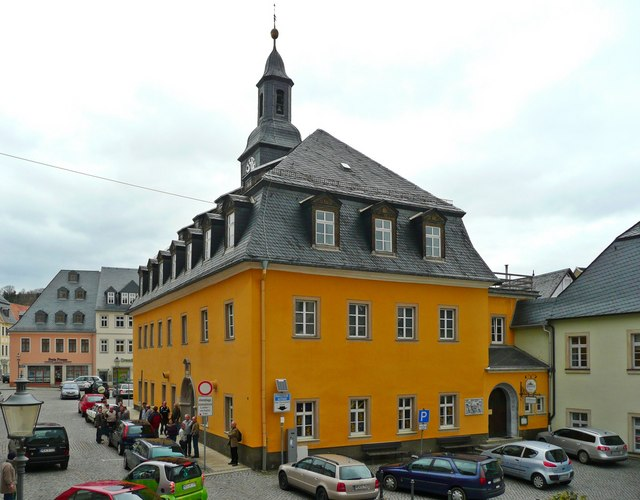 Zschopau: Blick auf das alte Rathaus